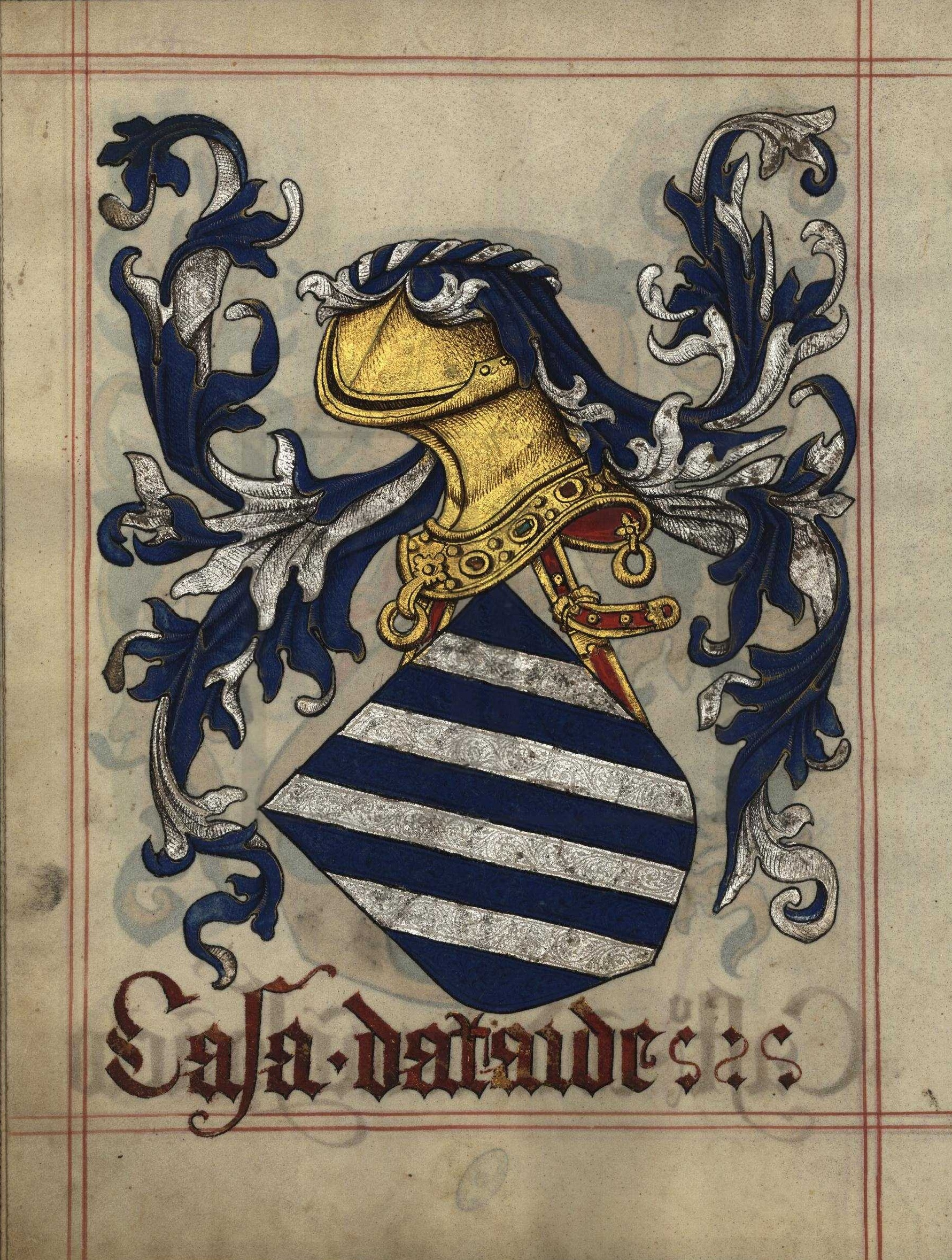 Livro do Armeiro-Mor, Ataide (fl 49v)